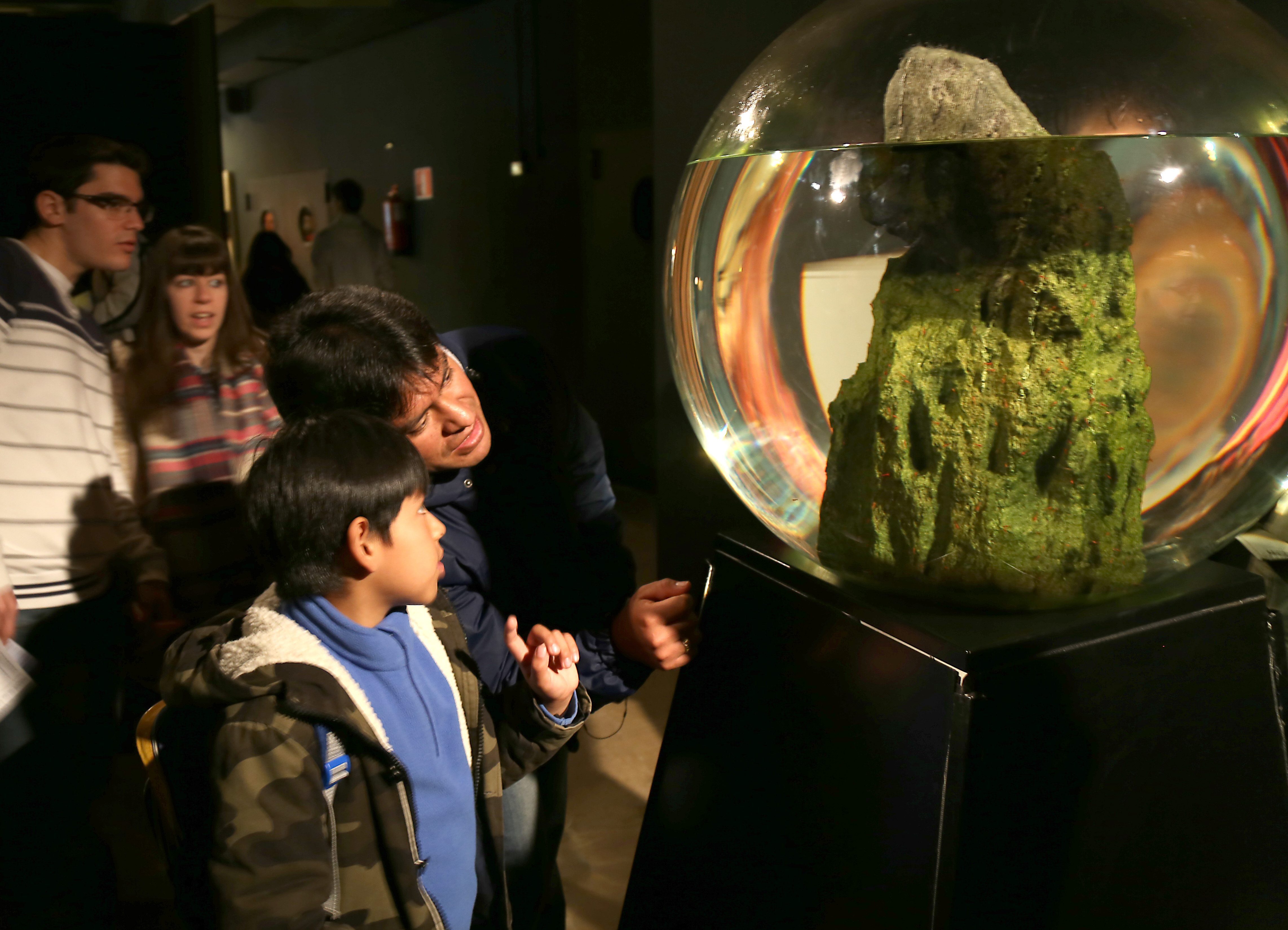 Esta ecoesfera contiene un ecosistema cerrado, donde conviven animales y algas que realizan la fotosíntesis gracias a la luz que reciben.